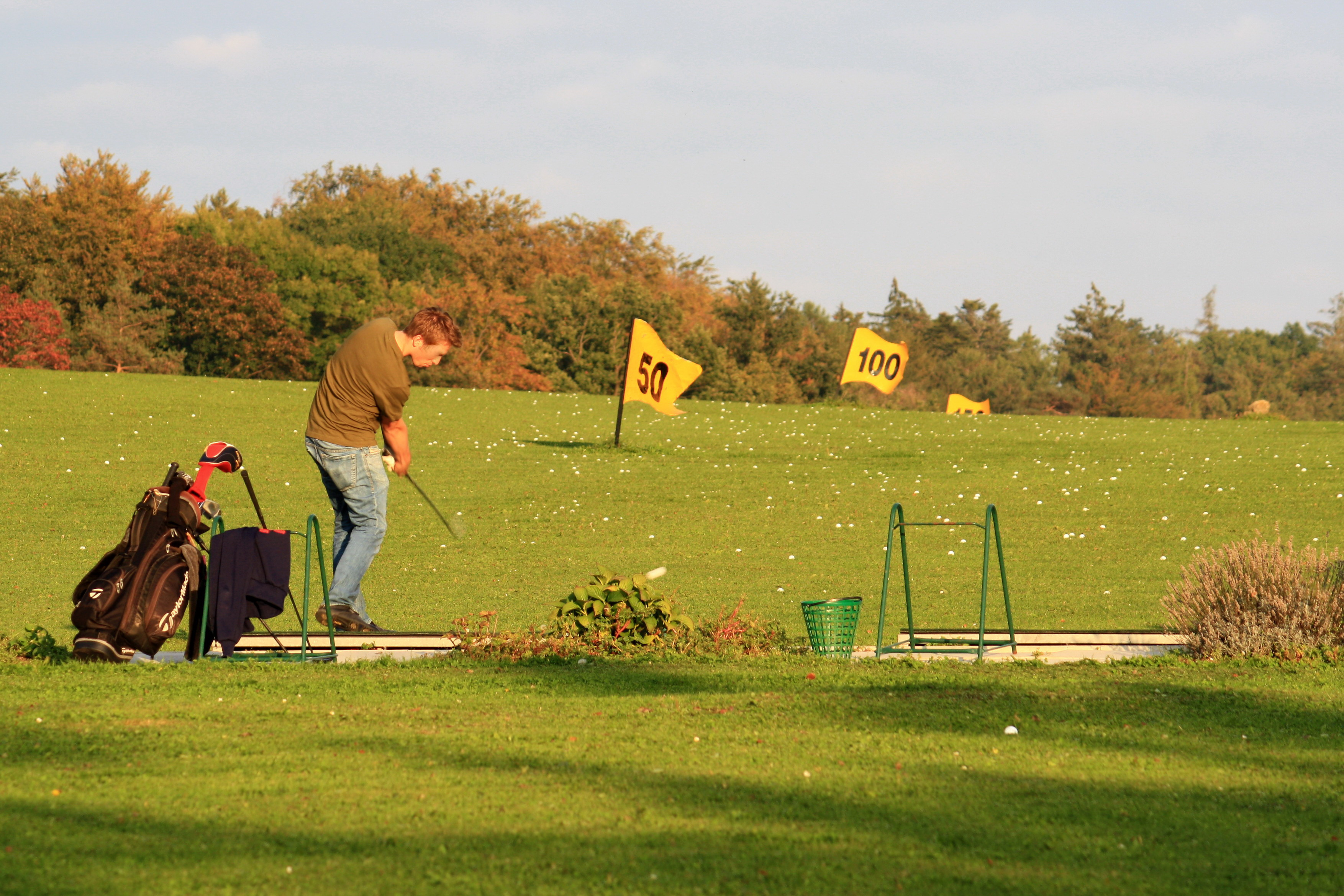 Dolder driving range on Adlisberg in Zürich (Switzerland)